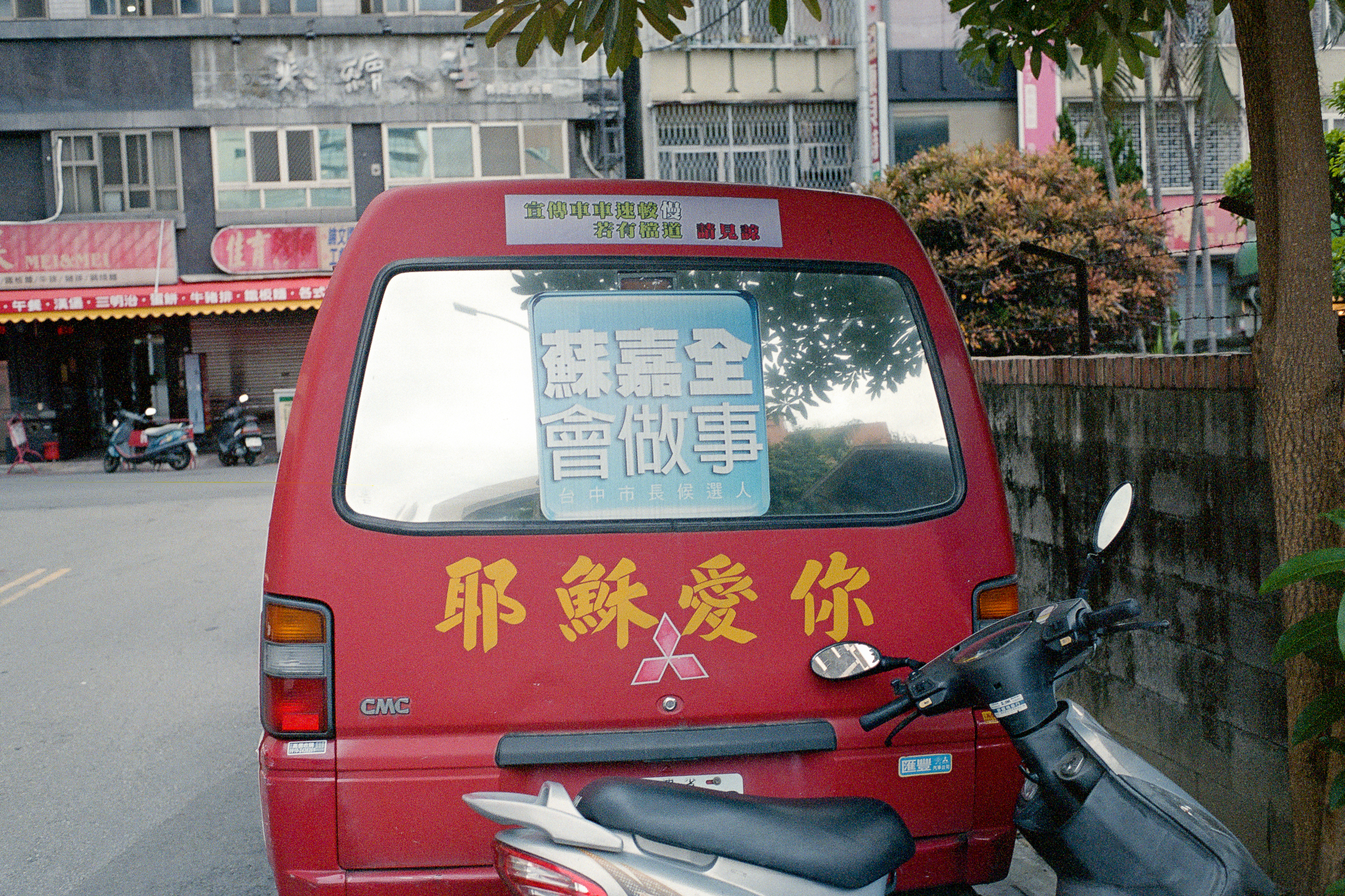 2010年臺中市市長選舉，民主進步黨提名市長候選人蘇嘉全中華得利卡宣傳車車尾。